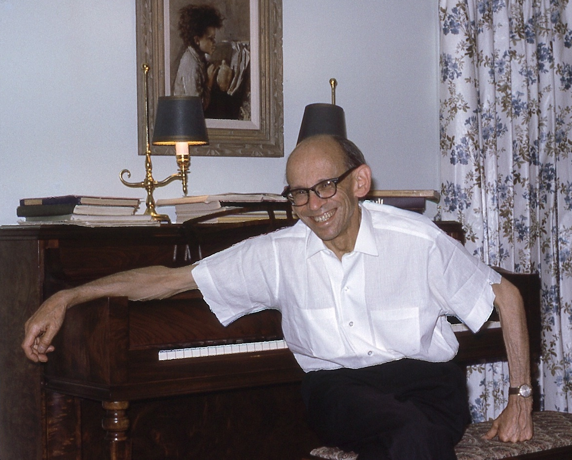 Walter Bricht in heimischer Umgebung